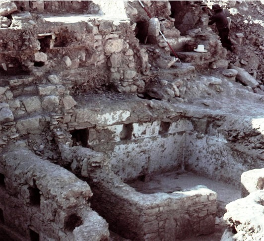 sitio Arqueológico de La Galgada, na Província de Pallasca , Região de Ancash, no Peru.